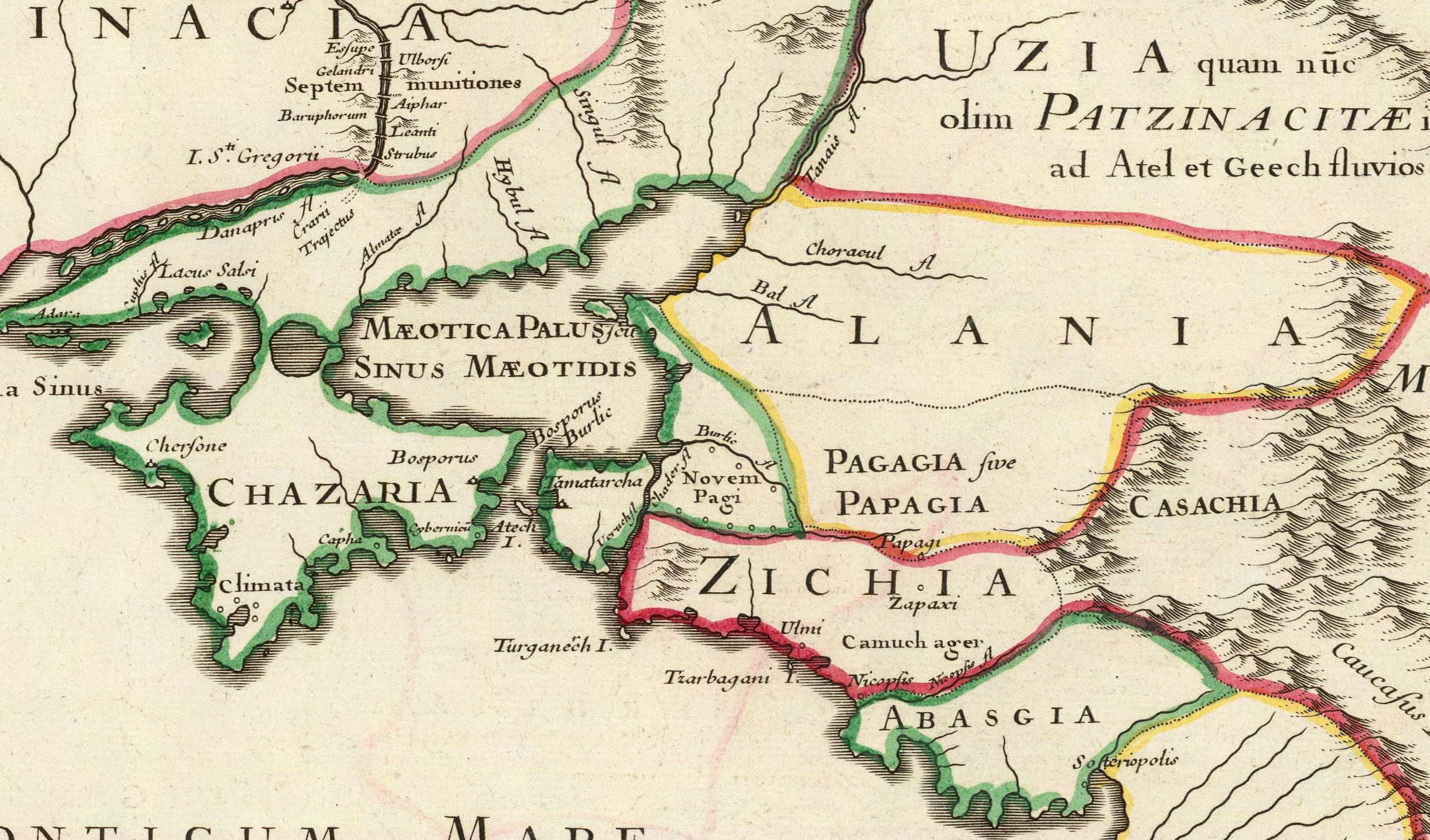 Imperii Orientalis et Circumjacentium Regionum, sub Constantino Porphyrogenito et ejus praedecessoribus descriptio. Auctore Guillelmo Del'Isle e Regia Scientiarum Academia, ad novam editionem Libri Constantini Porphyrogeniti de Administrando Imperio quae prodit studio Anselmi Bandurii, Monachi Benedictini Ragusini Melitensis cum ejus dem note et animadversionibus. (Paris : Guillelmo Del'Isle, 1715?).